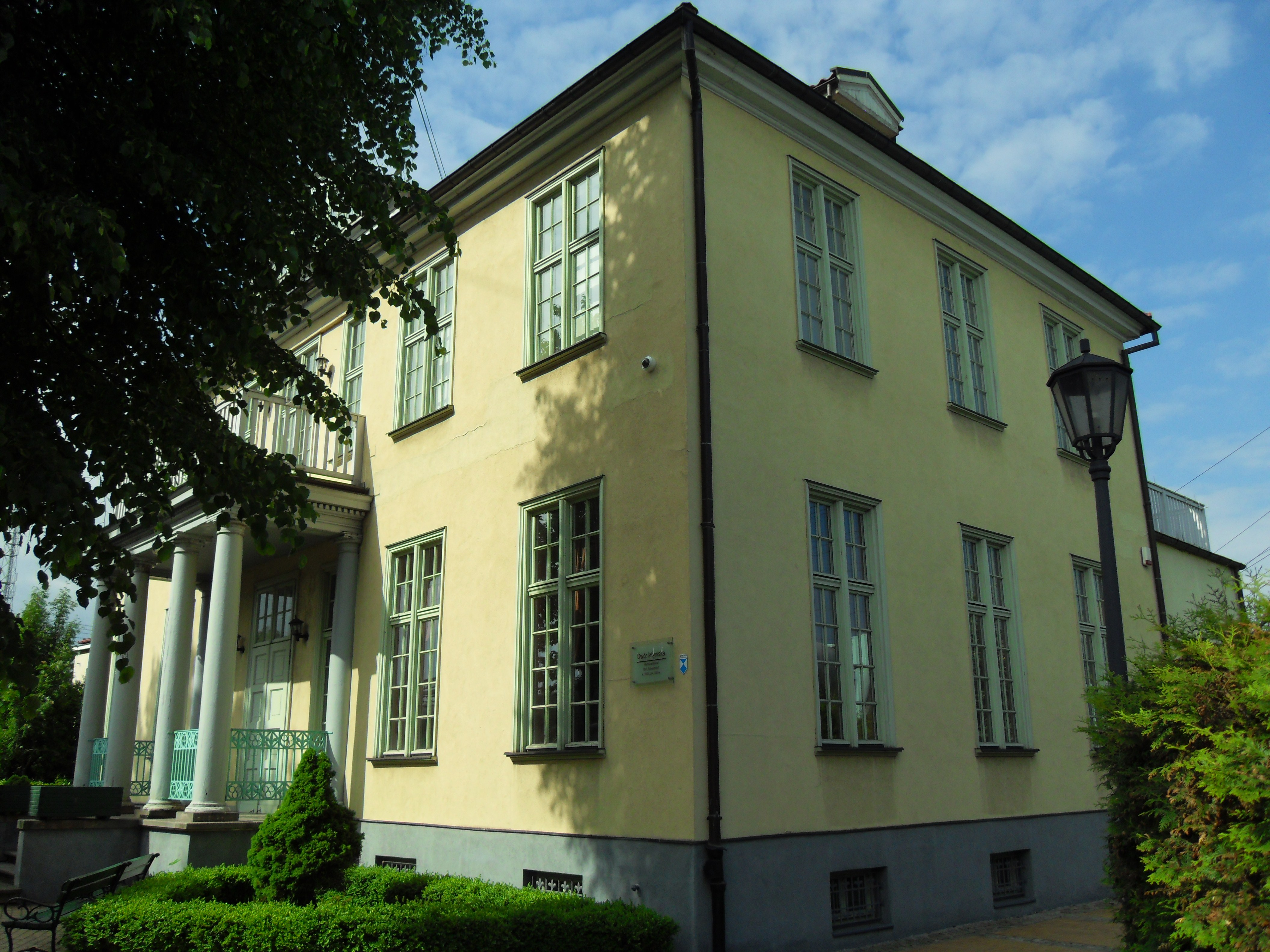 Gdańsk Młyniska, ul. Swojska 13 - Dwór "Młyniska" (zabytek nr 649 z 15.10.1973).